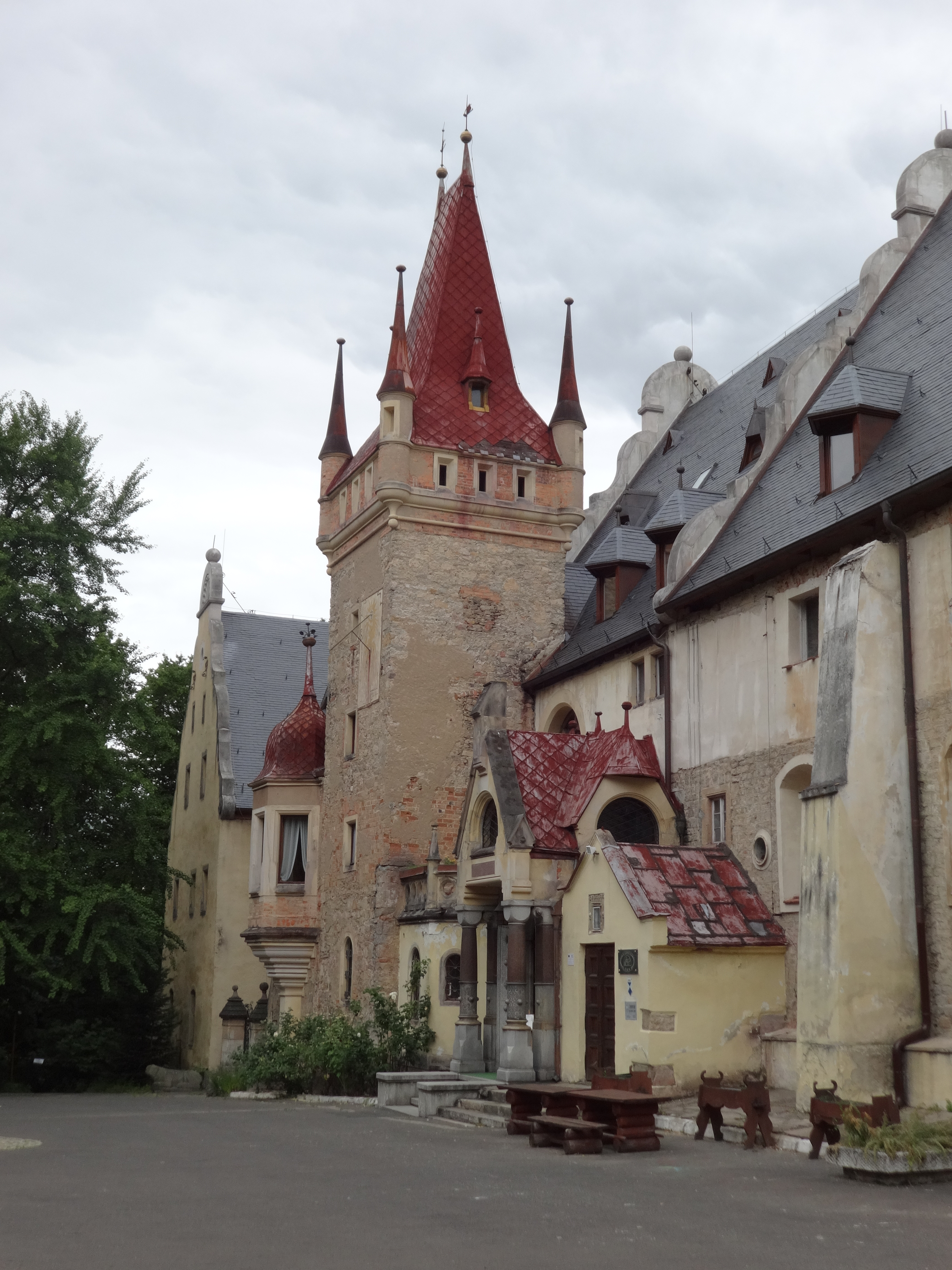 Sobótka, zamek